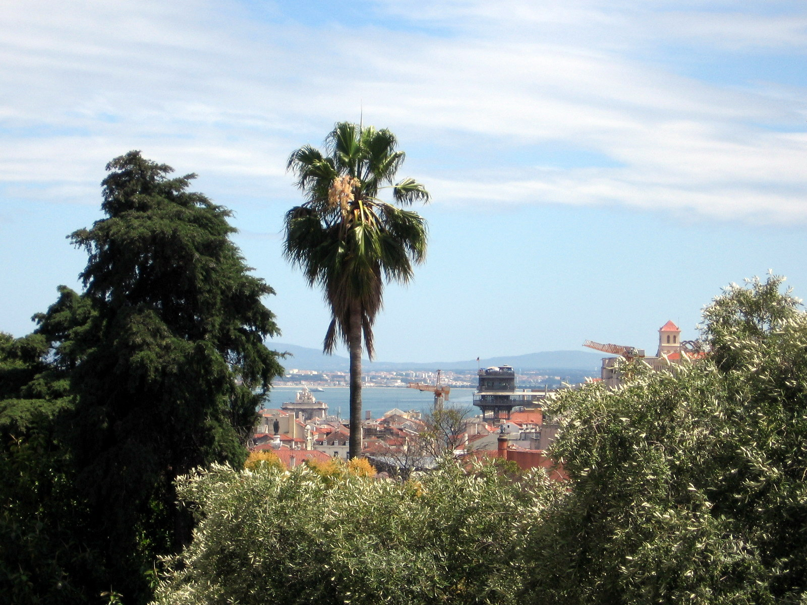 Miradouro do Torel, Jardim do Torel, Lisboa, Portugal